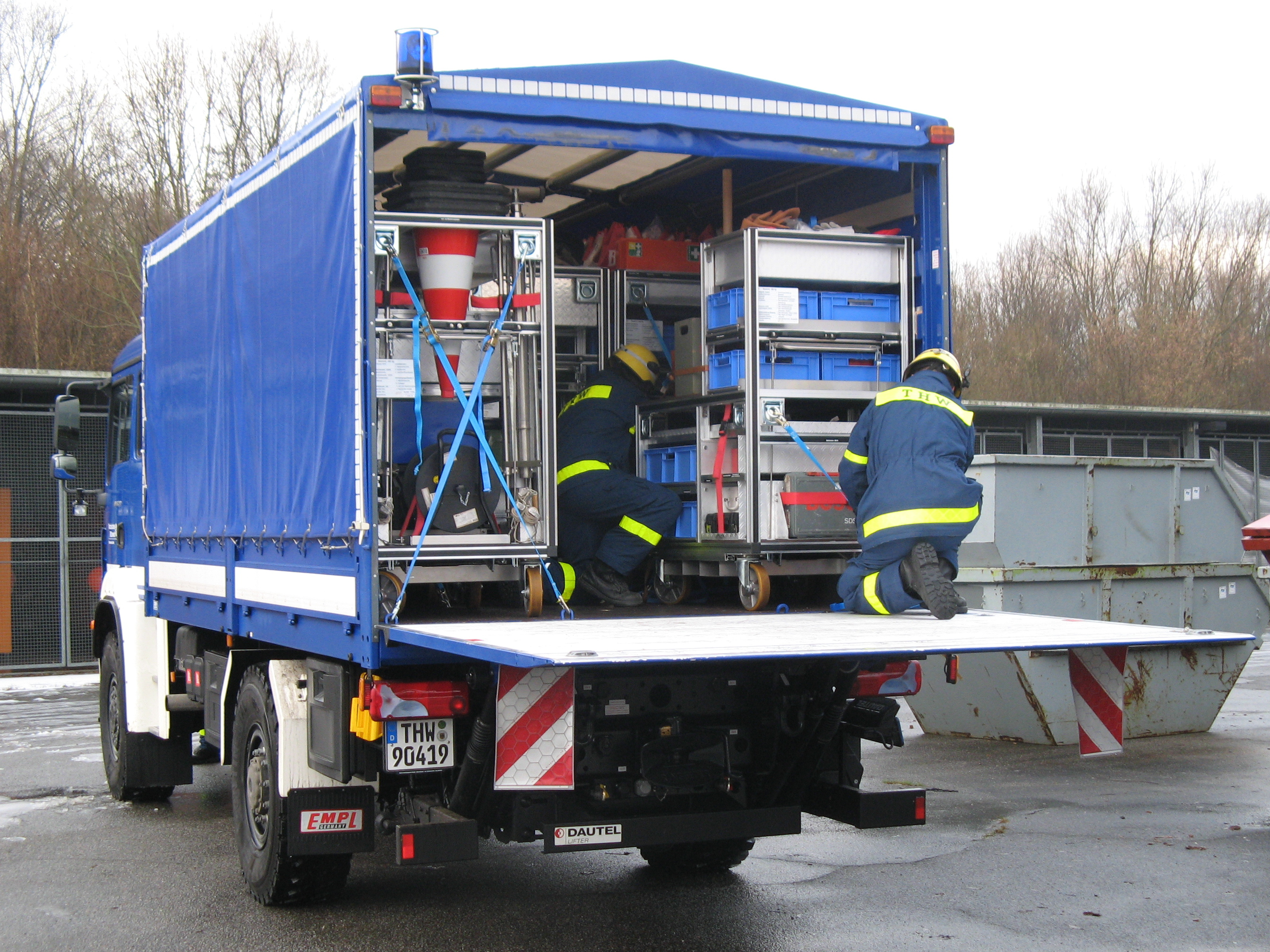 Die Ladefläche des MzKW mit Rollcontainern